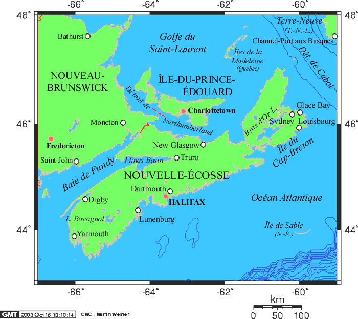 Carte de la Nouvelle-Écosse (créée par Montréalais à partir de matériaux en domaine publique) Catégorie:Carte de Nouvelle-Écosse